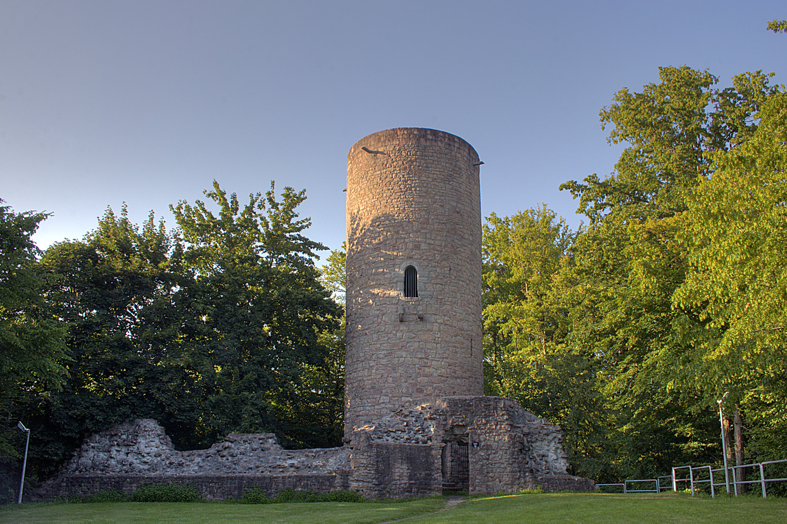 Burg Stolzenberg in Bad Soden in Deutschland